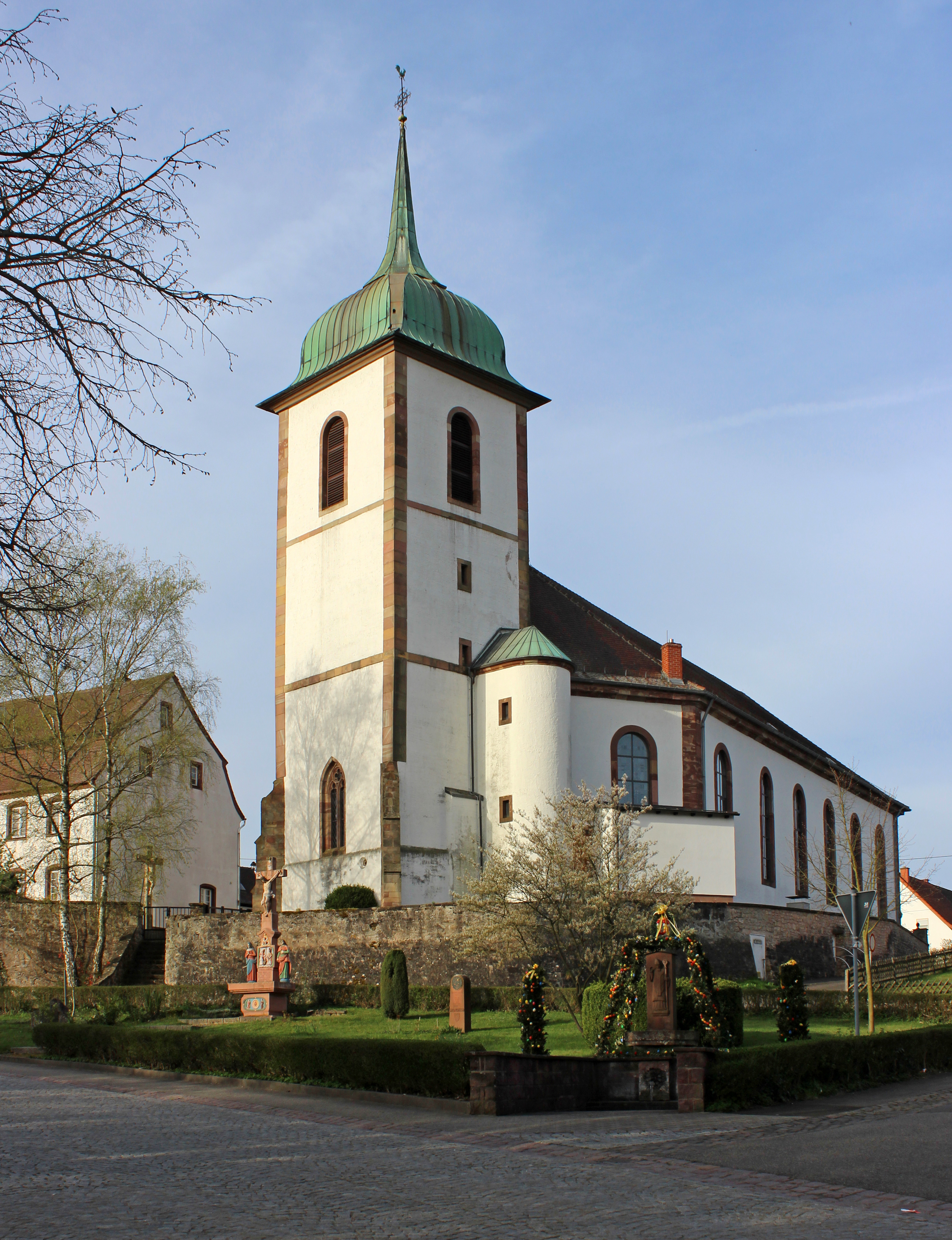 Die kath. Pfarrkirche St. Martin in Medelsheim, Gemeinde Gersheim, Saarpfalz-Kreis, Saarland